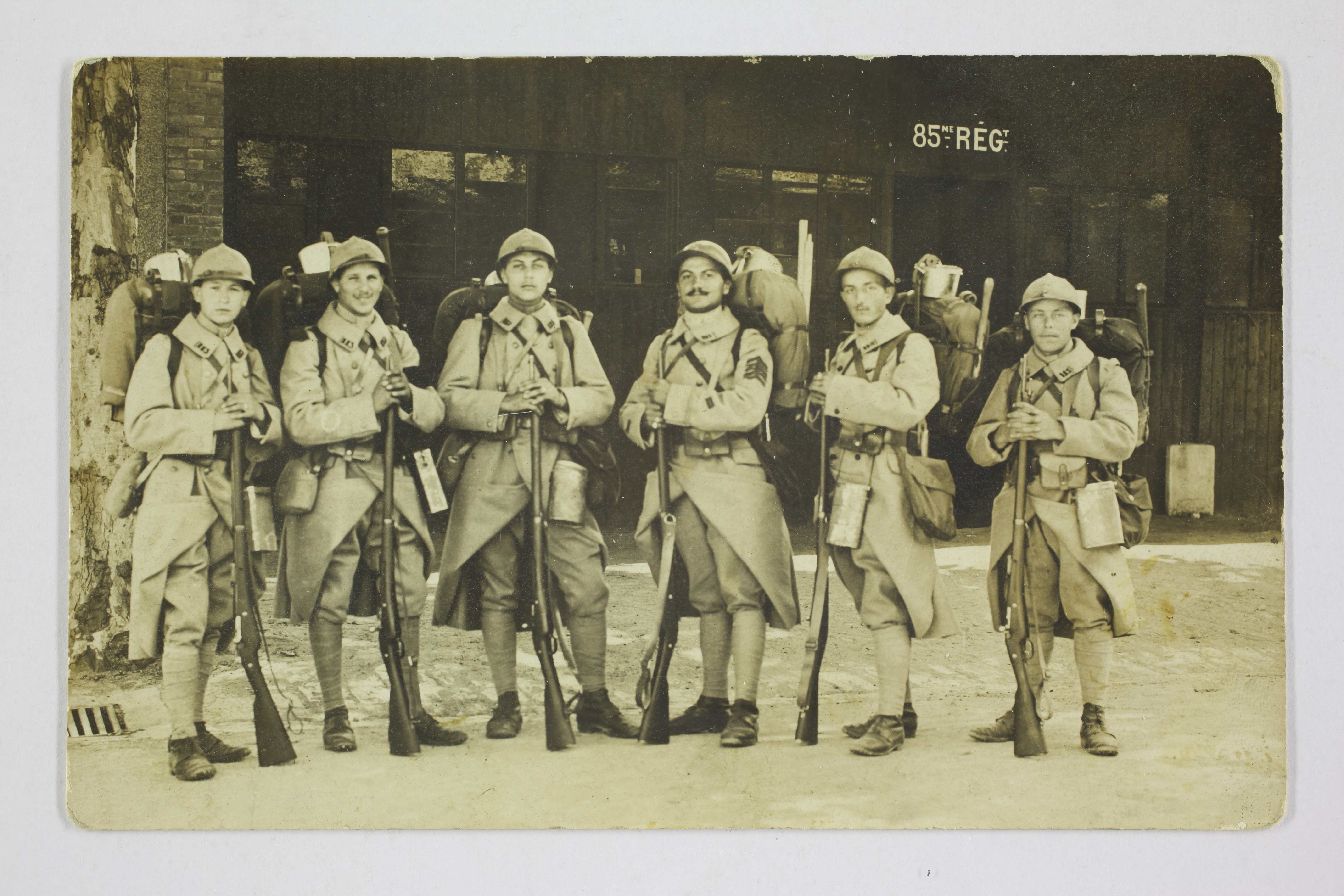 Caoutchoutier, fils de Jean BARGE et Marie LERAVOUX. Recruté à Clermont-Ferrand (département du Puy-de-Dôme, France), classe 1914, matricule 459. Incorporé à compter du 12/09/1914 au 98e régiment d'infanterie puis au 69e régiment d'infanterie le 29/12/1914. Atteint de "gelure des pieds" le 18/01/1915. Caporal le 17/07/1916. Passé au 113e régiment d'infanterie le 01/09/1918 puis au 69e régiment d'infanterie le 12/02/1919. Sergent le 01/04/1919. Envoyé en congé de démobilisation le 09/09/1919. Cité à l'ordre du régiment le 03/06/1919, croix de guerre.